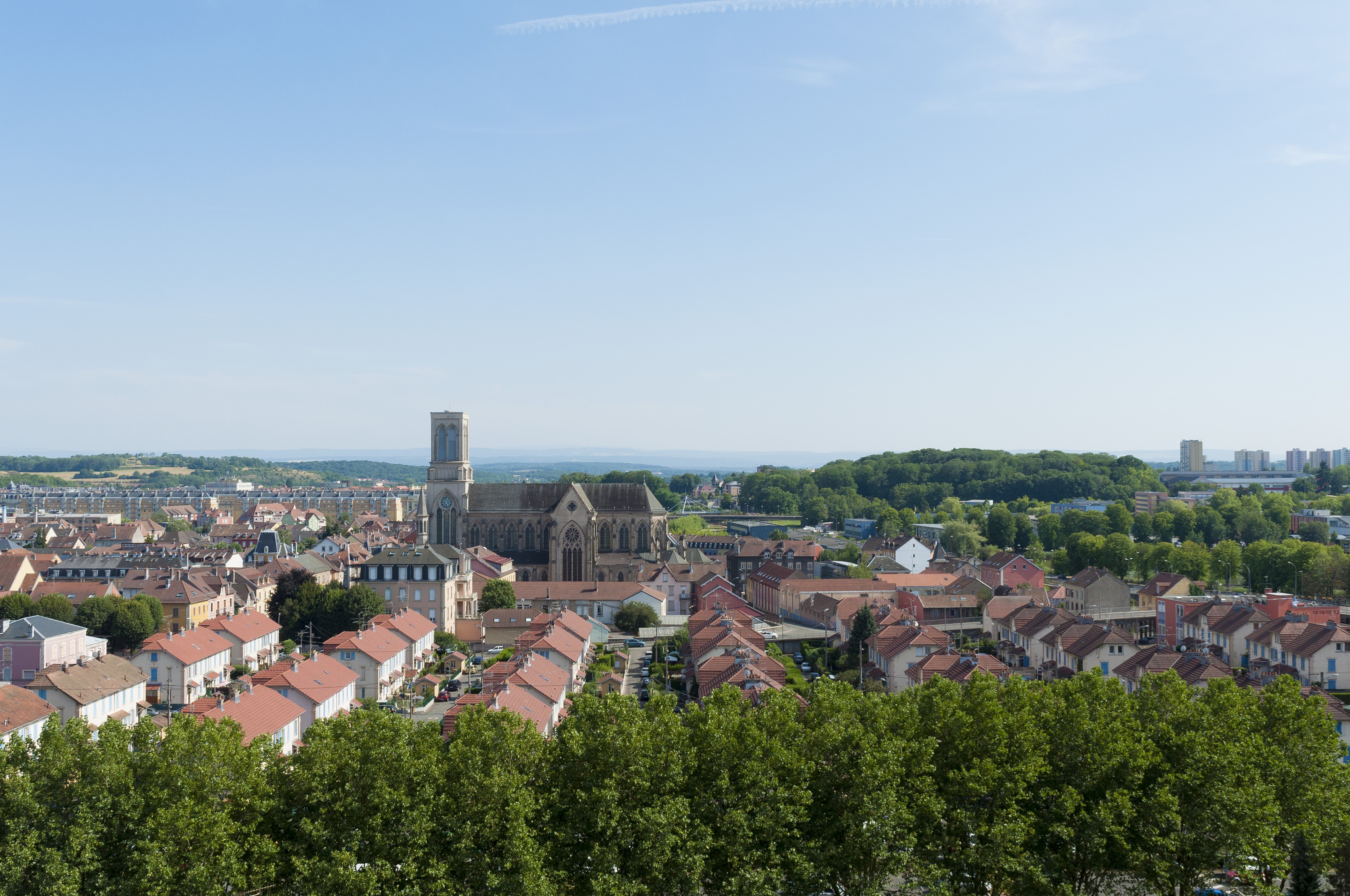 Anciennes cites ouvrières Alsthom et son église St Joseph .